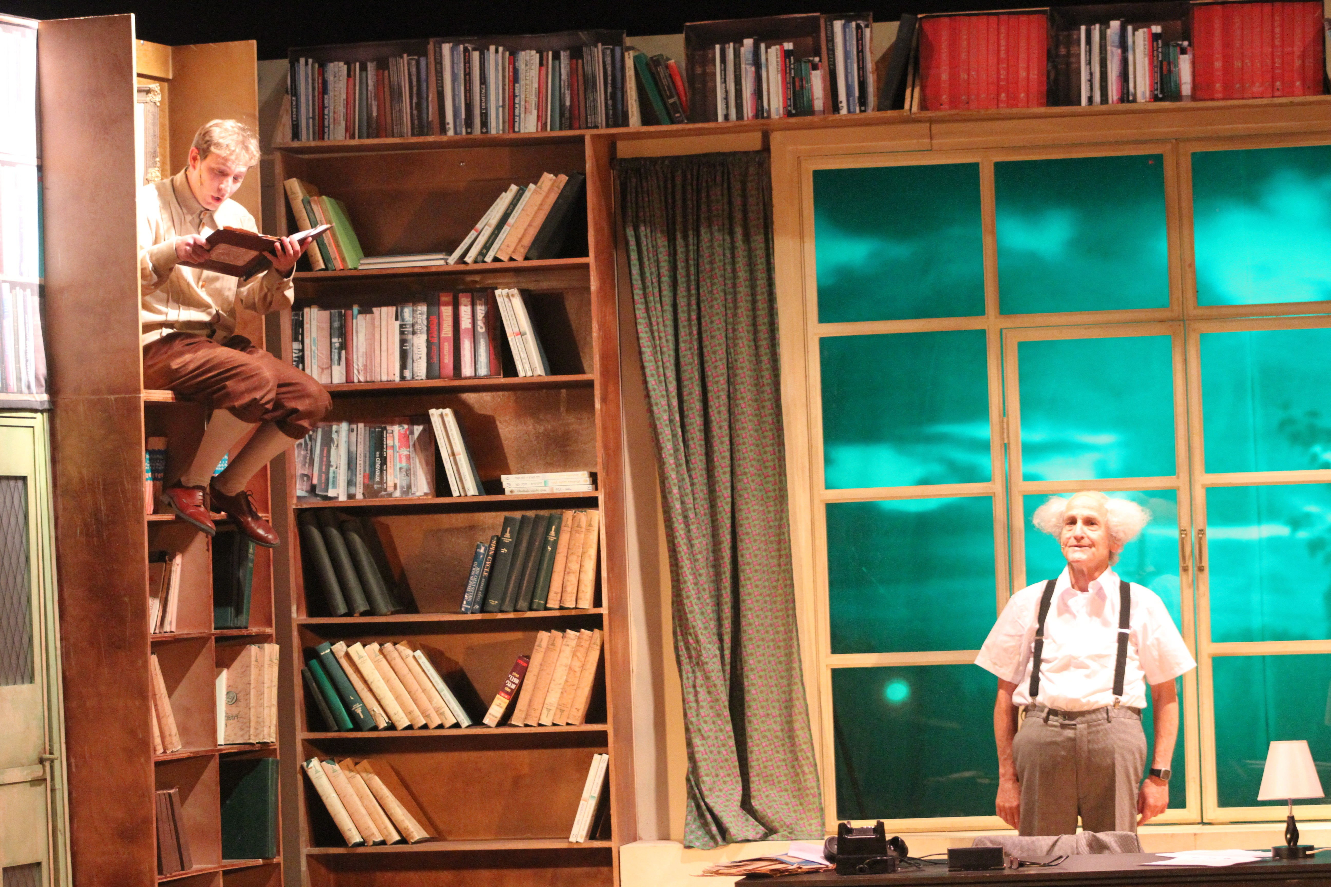 10 דוד ובן גוריון 2012 (בתמונה ישראל גוריון ואסף שצברג) צילום - תומר קרלינסקי